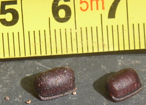 Zwei Eikapseln von Periplaneta Americana; Florianópolis, SC, Brasilien